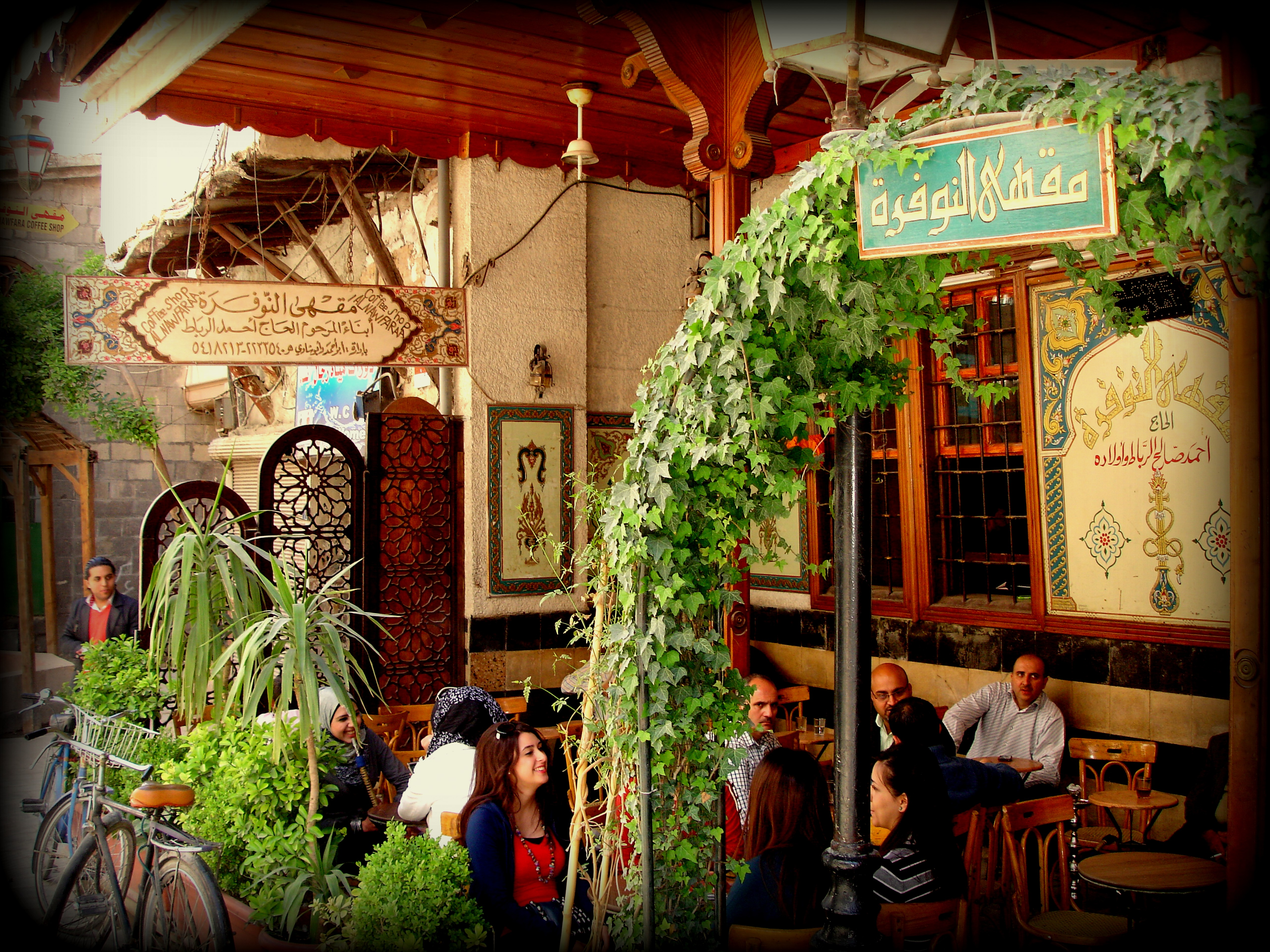 مقهى شعبي قديم يقع في دمشق القديمة في القيمرية....